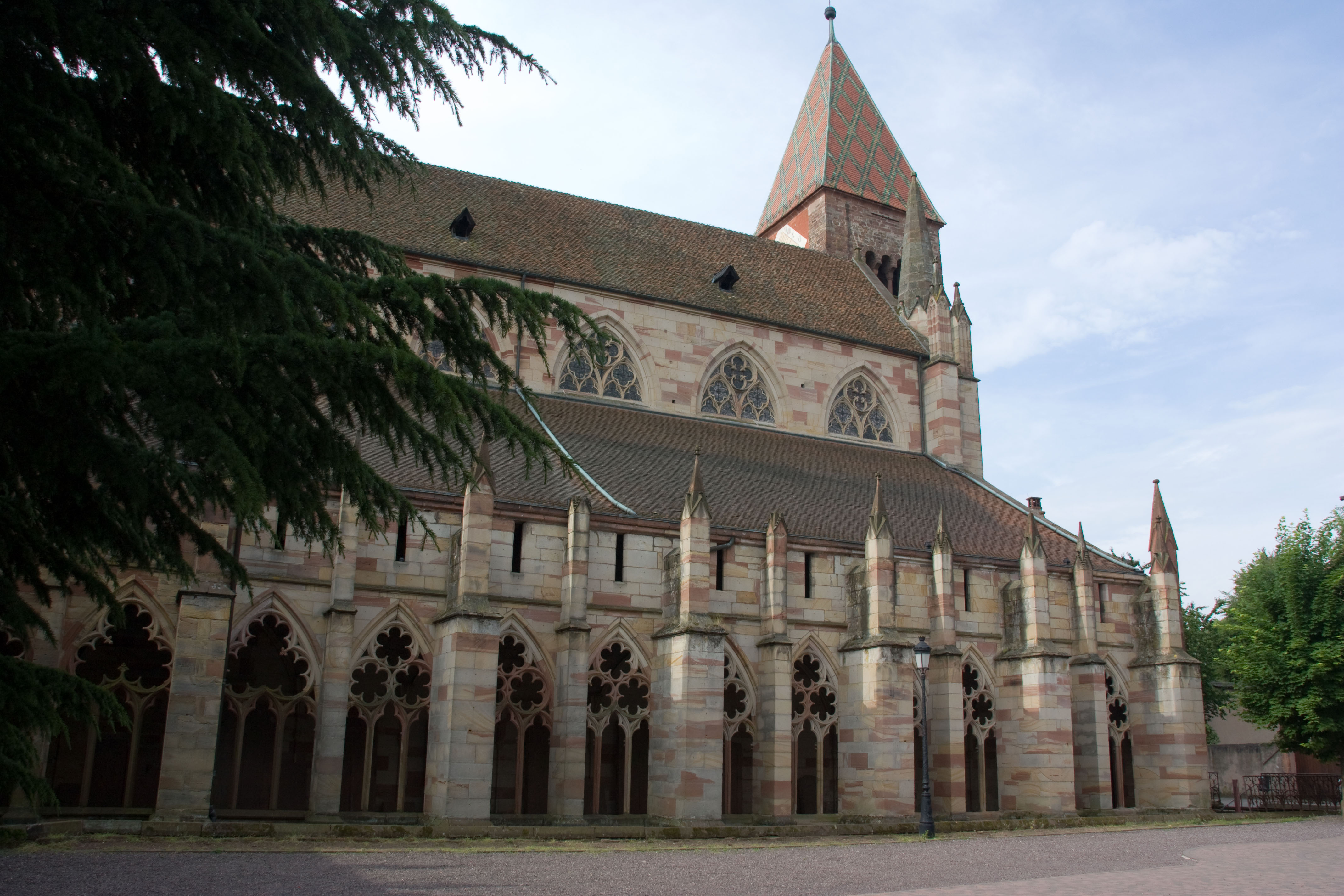 Eglise Saints-Pierre-et-Paul, Wissembourg, Alsace, France